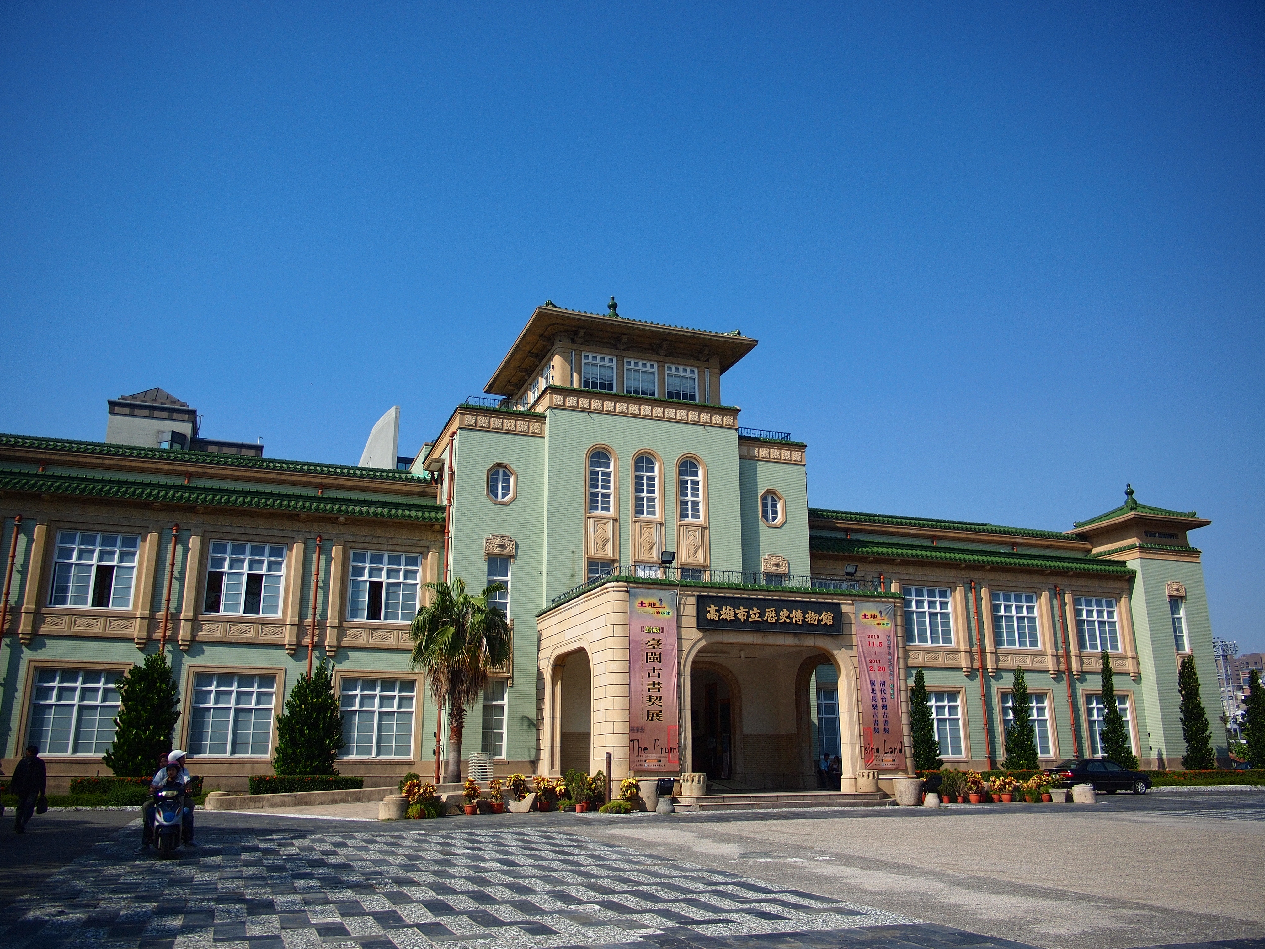 中文（台灣）: 高雄市立歷史博物館正面。